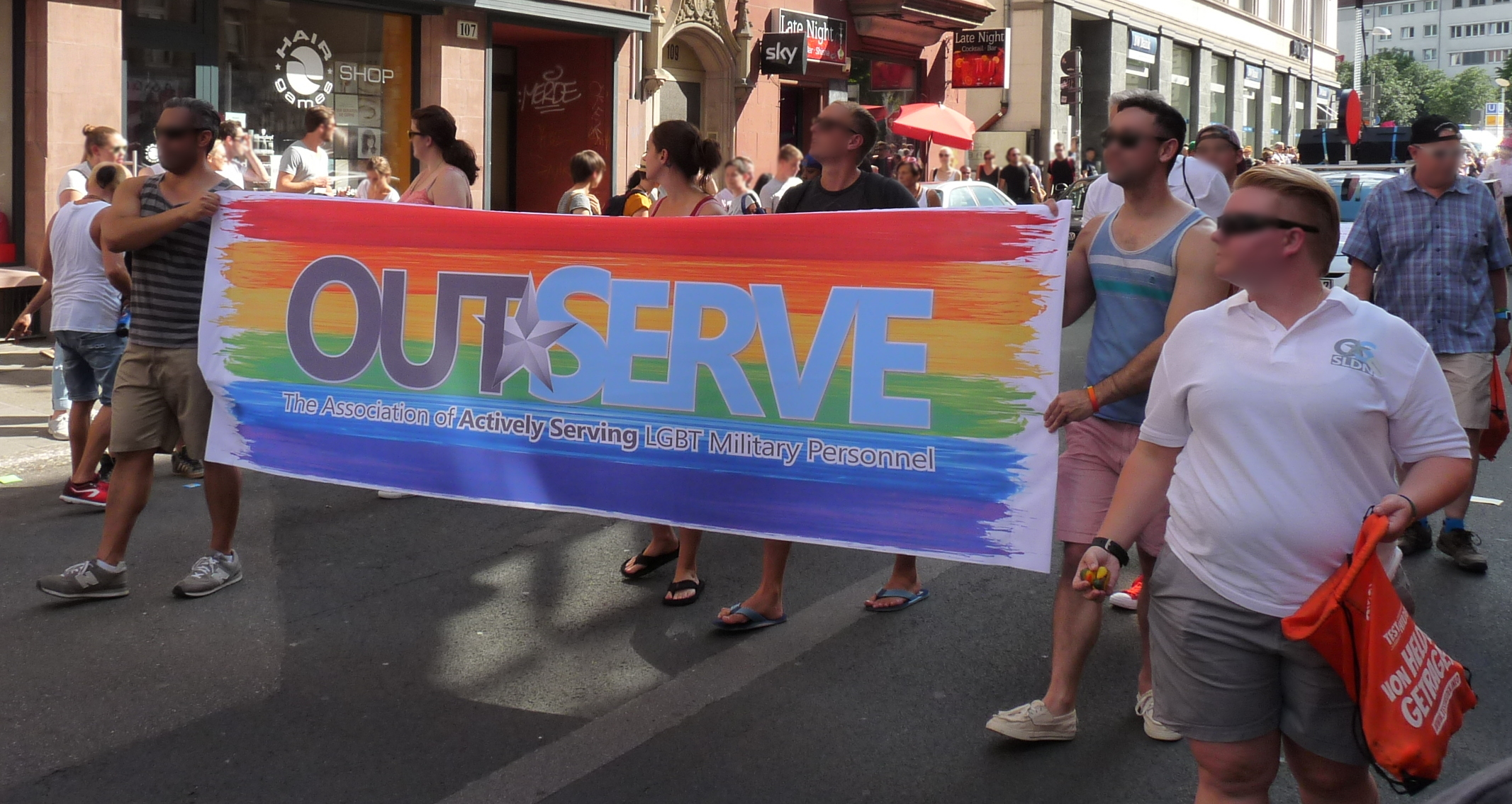 Stuttgart - CSD 2016 - Parade - OutServe-SLDN Germany